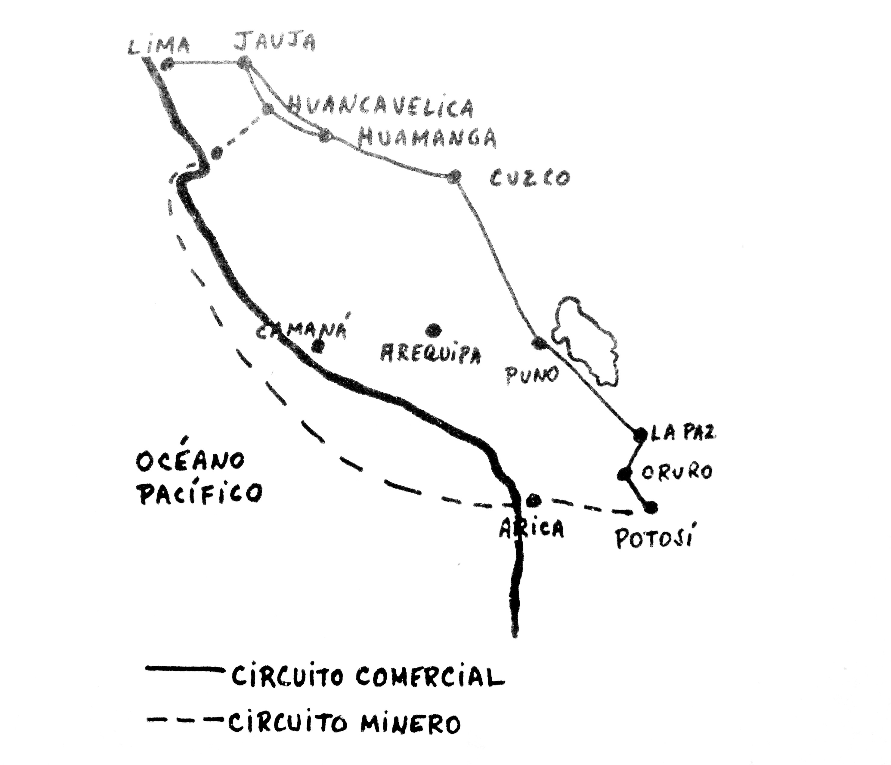 Circuito socio-comercial de la Colonia